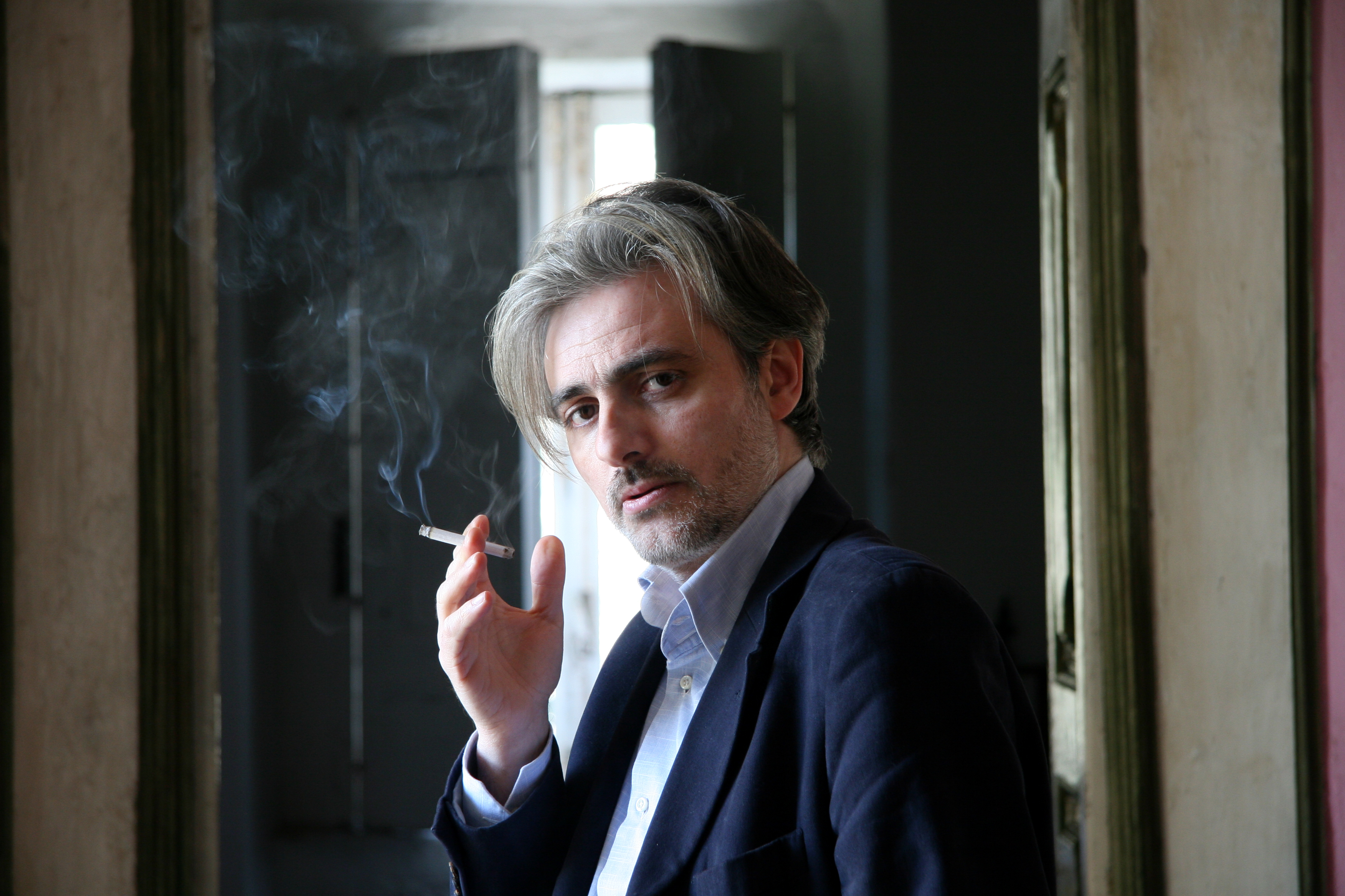 regista